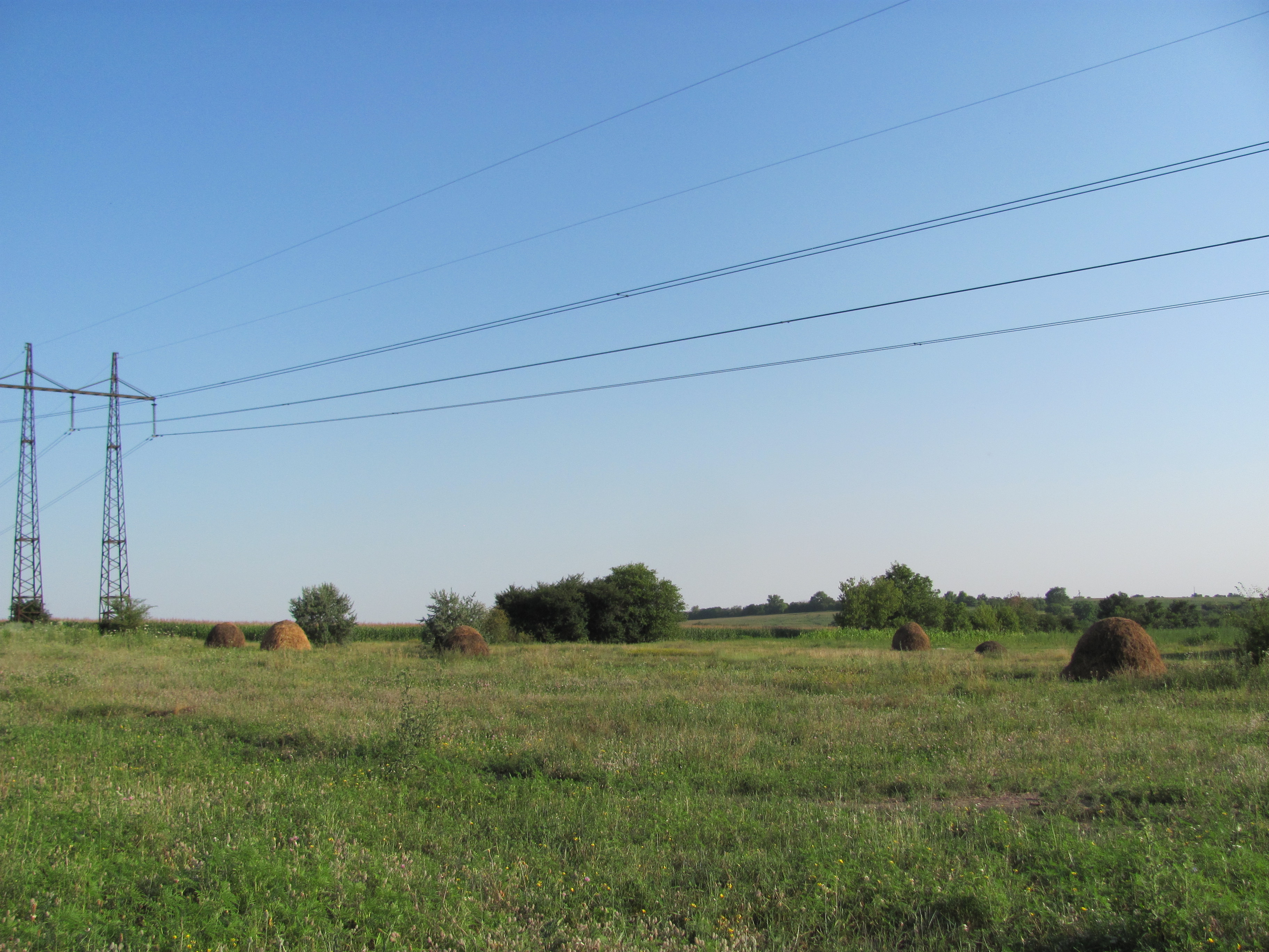 Панорама села Чернече, 2016-й рік